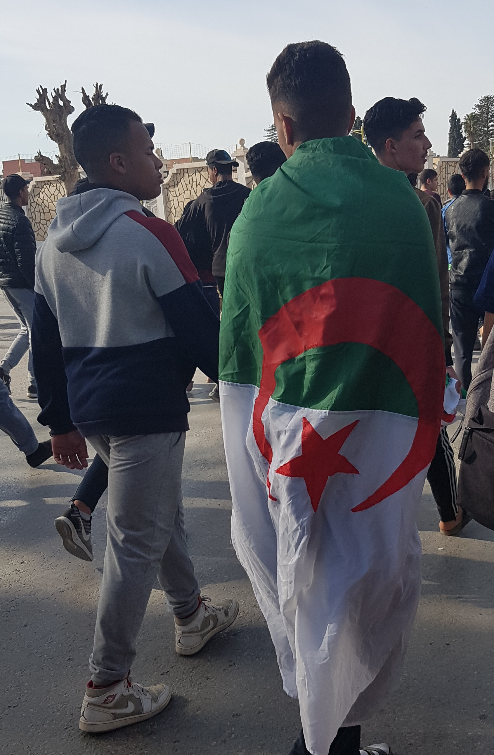 Algeria Protests 2019 2ndweek 1